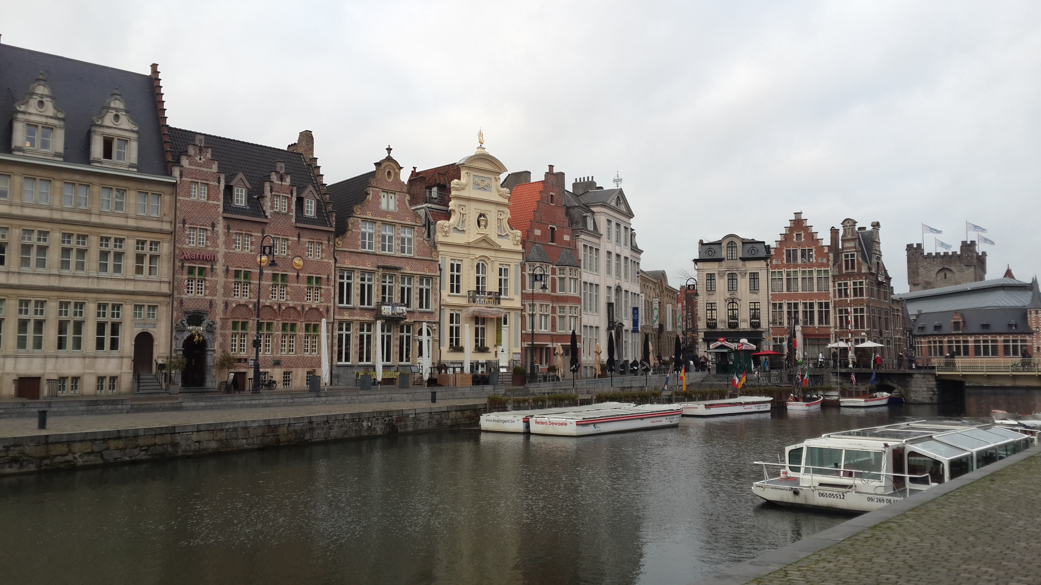 Vista del Río Lys en Gante. Bélgica.